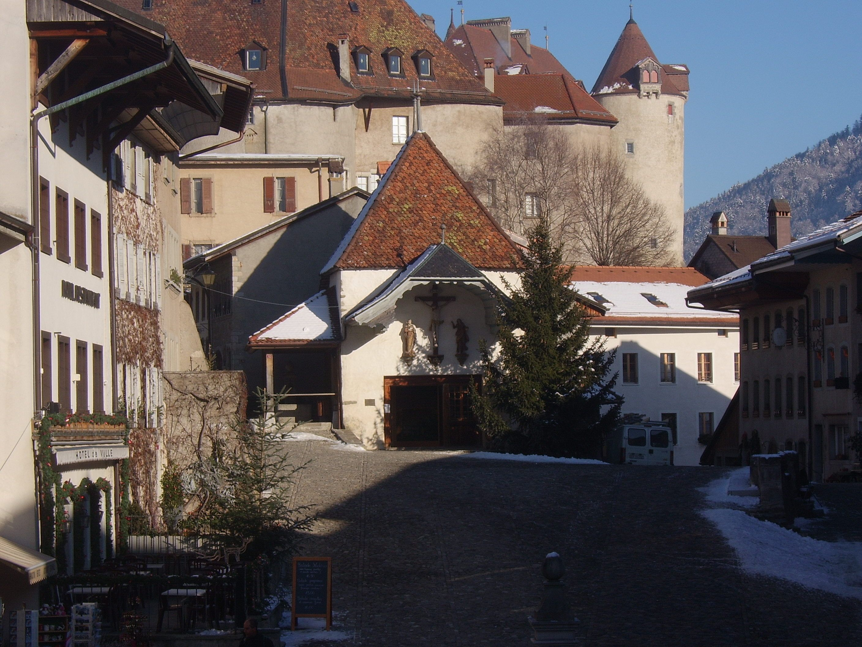 dawna kaplica